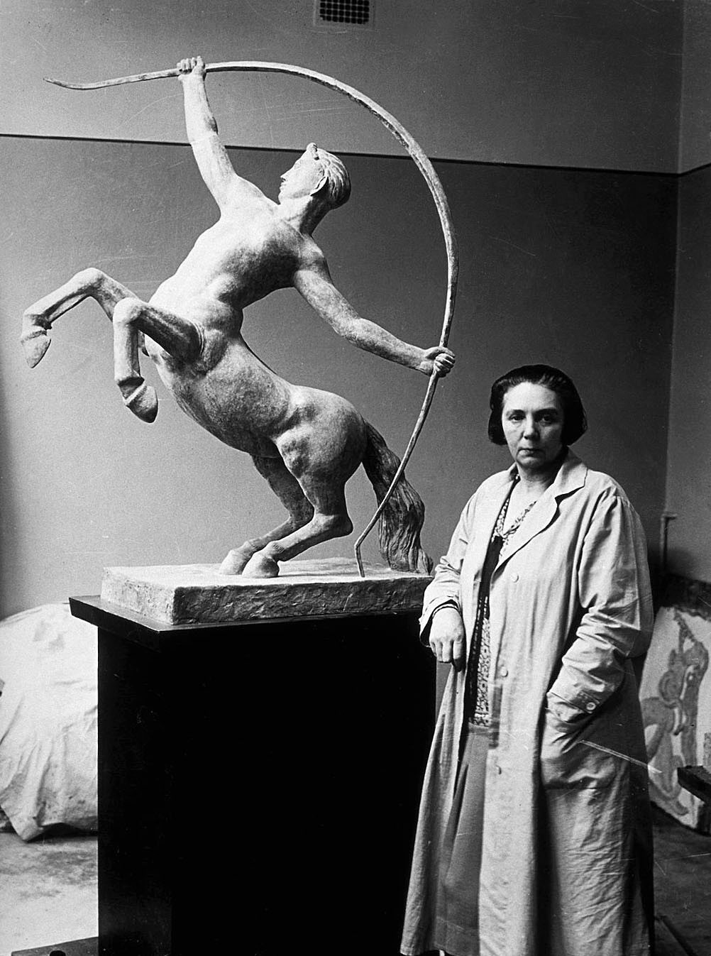 Sigrid Fridman med skissen till skulpturen "Kentauren"